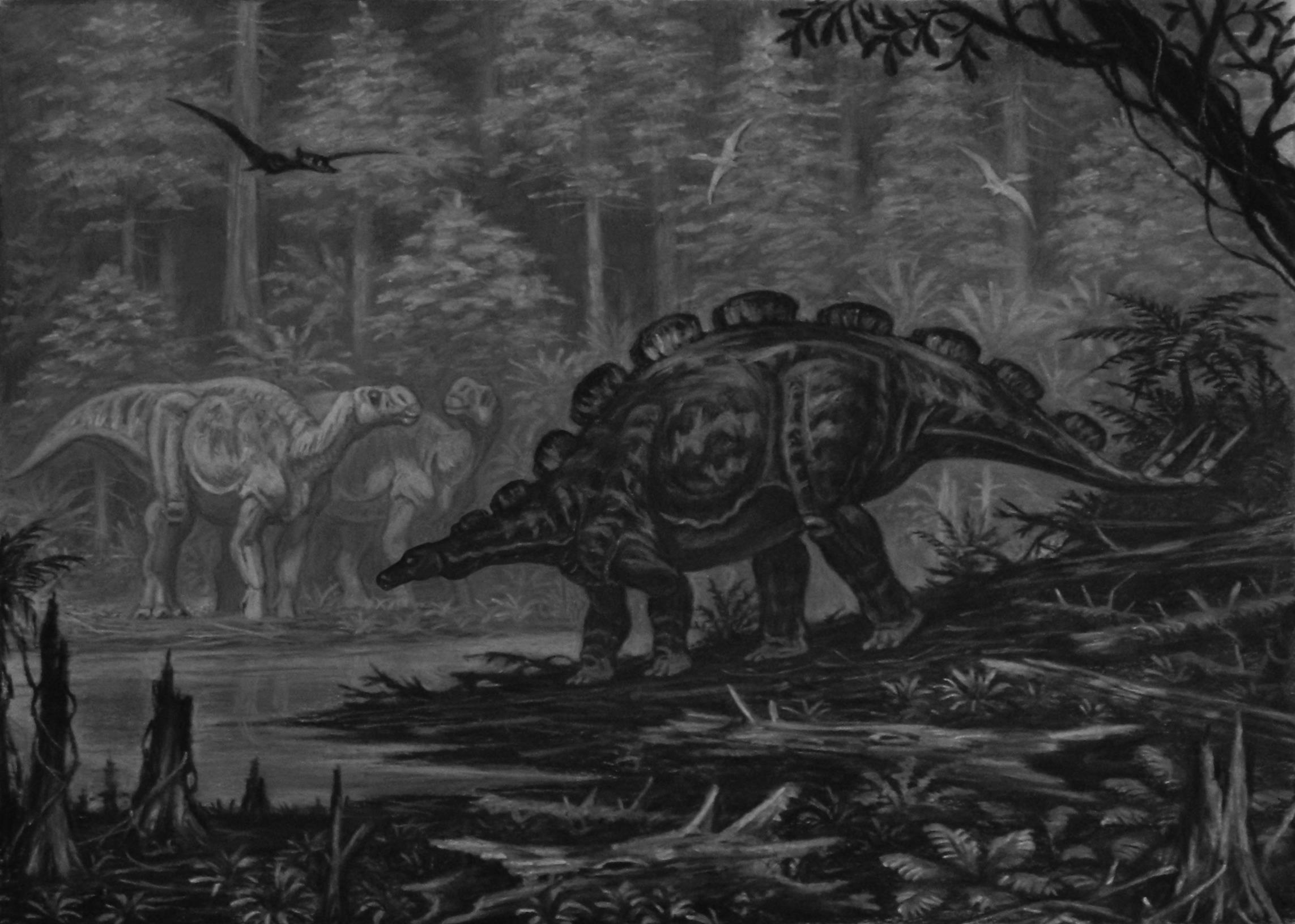 Wuerhosaurus.